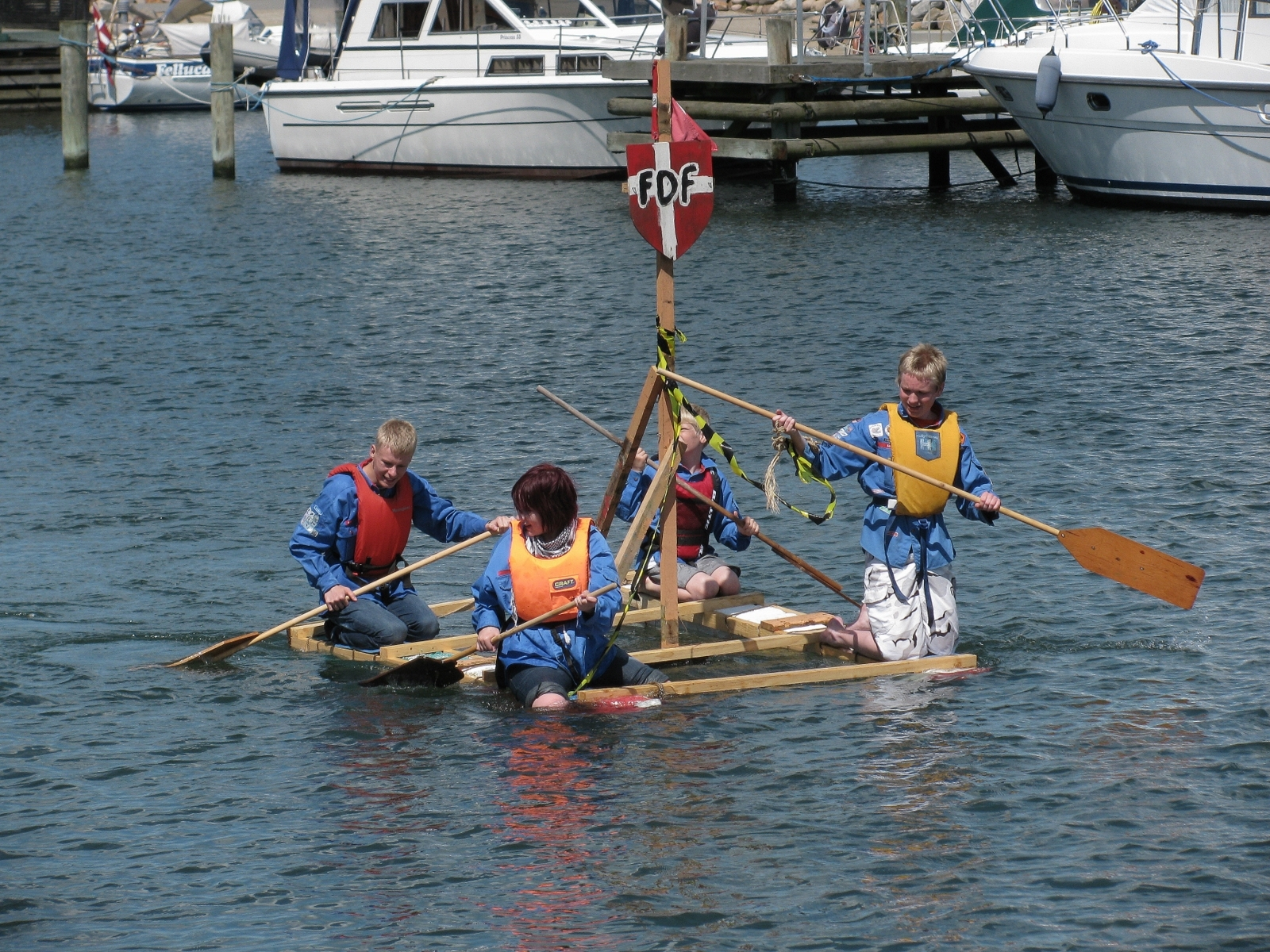 åbent hus frederikshavn havn 13. juni 2009